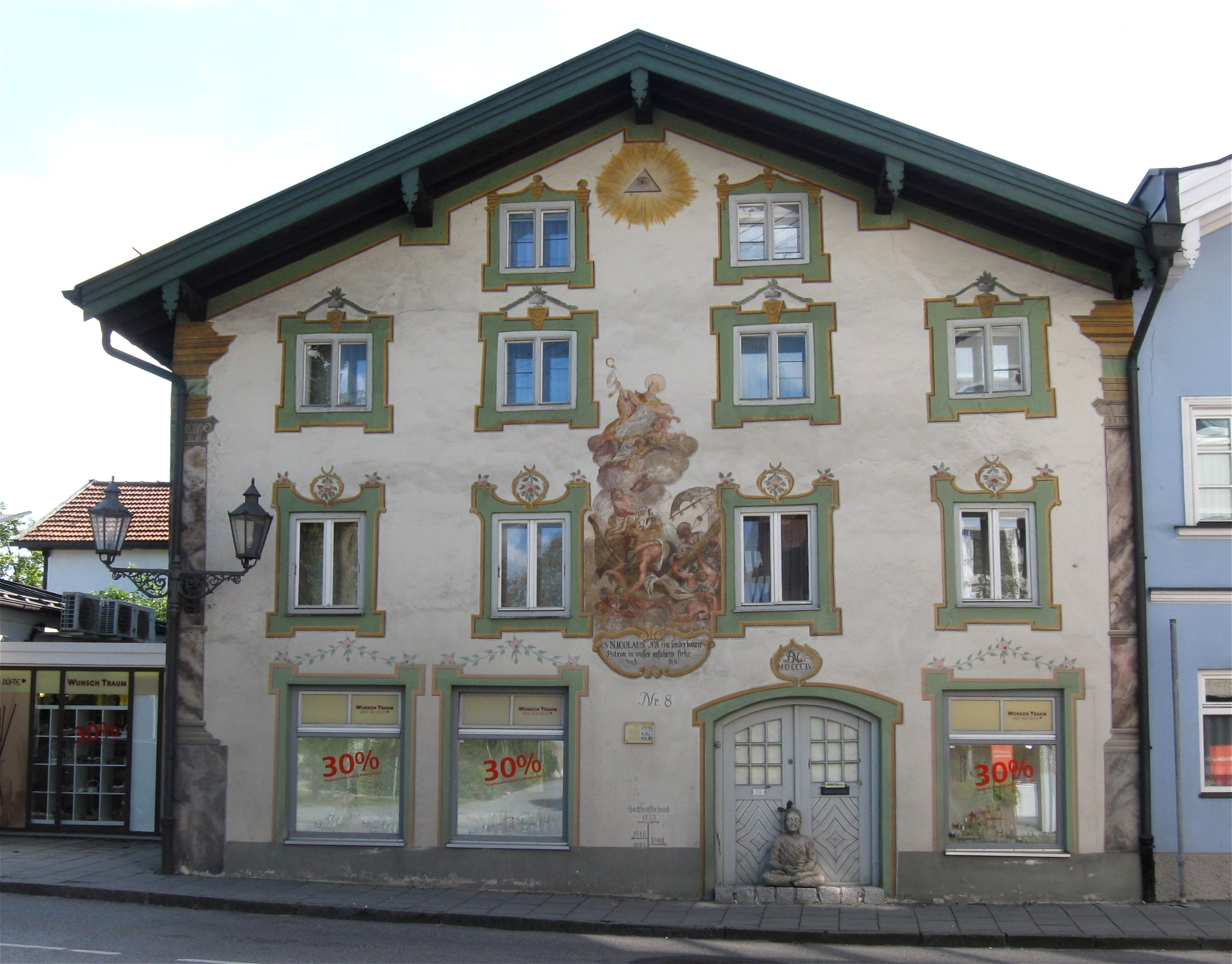 Johannisgasse 8; Wohnhaus, Wohnhaus mit Flachsatteldach, reicher Bemalung, Hausspruch und Jahrzahl 1804.